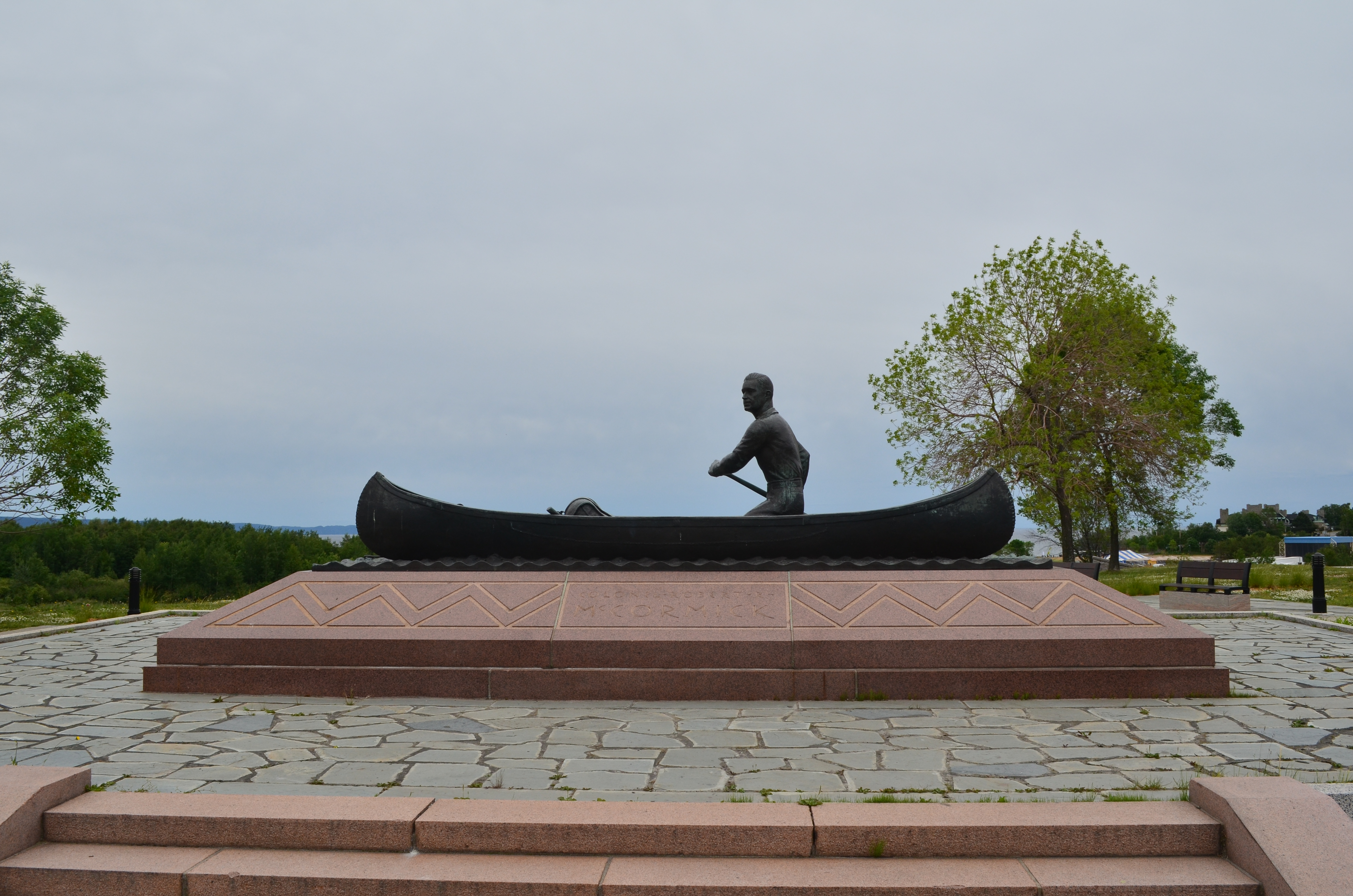 Statue du colonel McCormick sur la place du même nom à Baie-Comeau